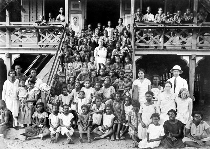 Repronegatief. Kinderhuis Saron voor Creoolse kinderen met Broeder en Zuster Boon en de inwoners van de Creoolse afdeling van Saron.